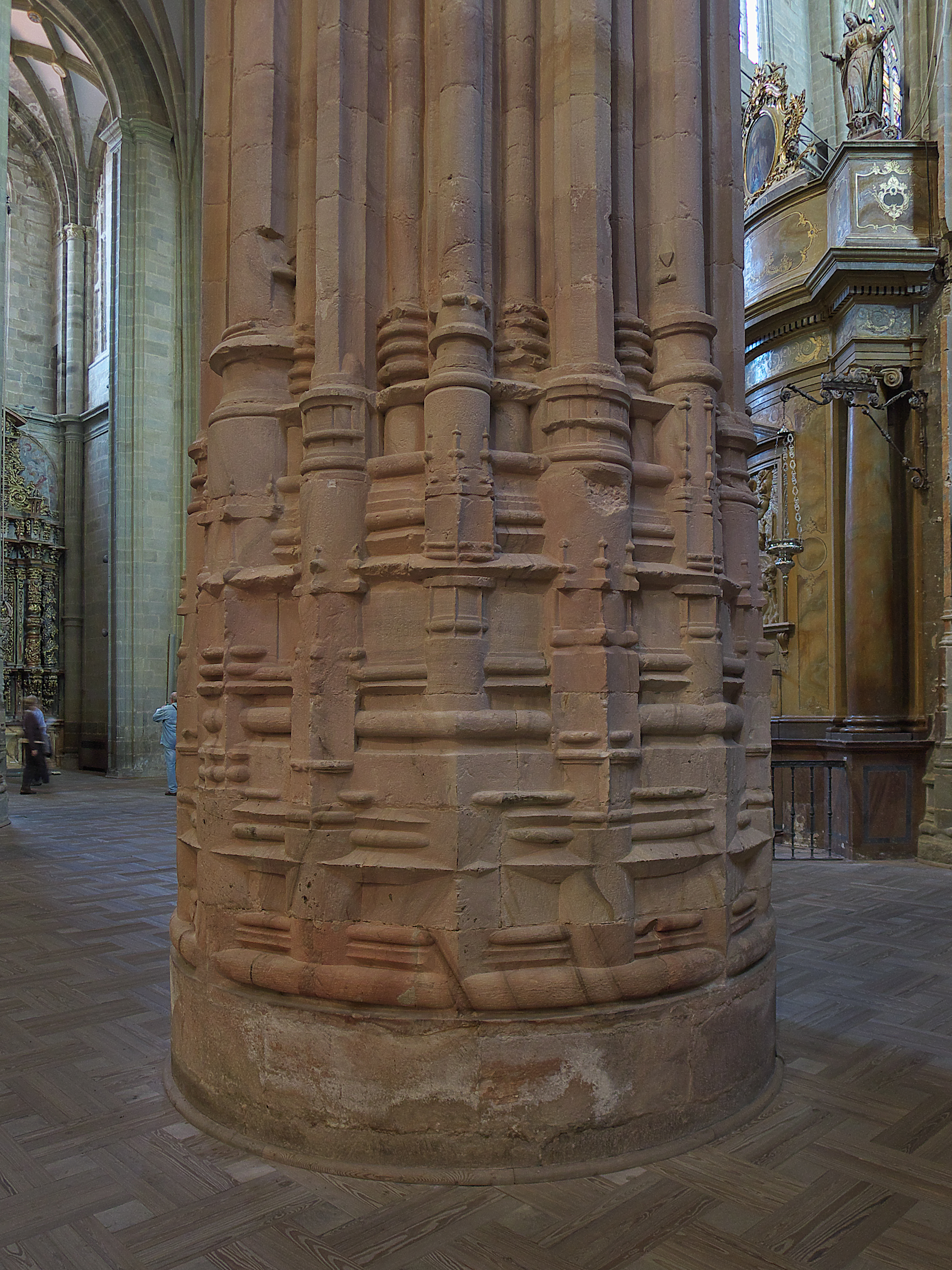 Pilar del último tramo de la catedral, probablemente diseñado por Rodrigo Gil de Hontañón (1542). Se observa el conjunto de baquetones, necesarios para distribuir los esfuerzos y las cargas.